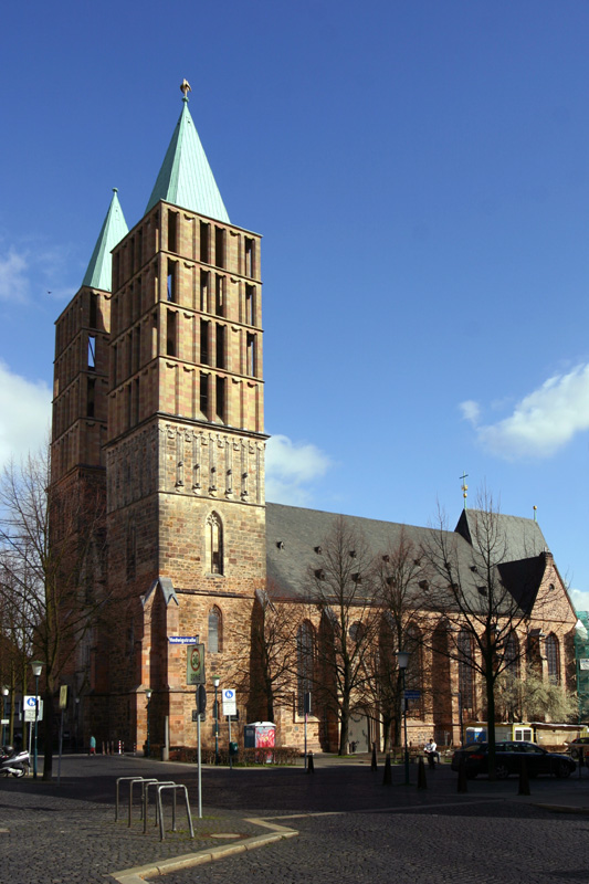 Die Martinskirche (auch St. Martin) in Kassel, ist eine evangelische Pfarrkirche und die Predigtstätte des Bischofs der Evangelischen Kirche von Kurhessen-Waldeck. Die gotische Kirche wurde vor 1364 begonnen und 1462 geweiht.